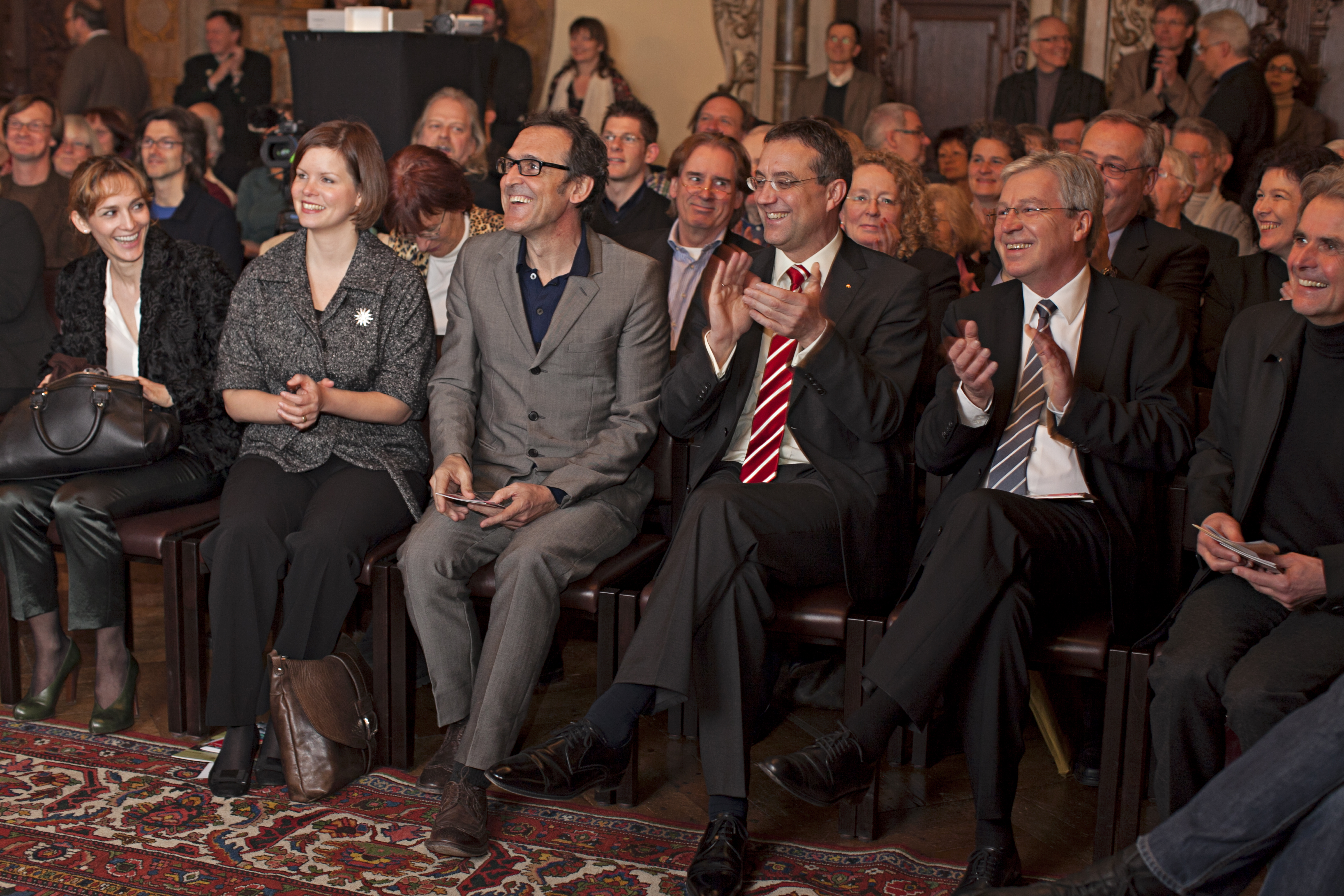 Impression von der Verleihung des Bremer Filmpreises 2011 an Alberto Iglesias. Zu sehen sind unter anderem der Filmkomponist Alberto Iglesias (Dritter von links), der Bürgermeister Bremens Jens Böhrnsen (Zweiter von rechts) sowie Karl-Heinz Schmid vom Kommunalkino Bremen/City 46 (ganz rechts).